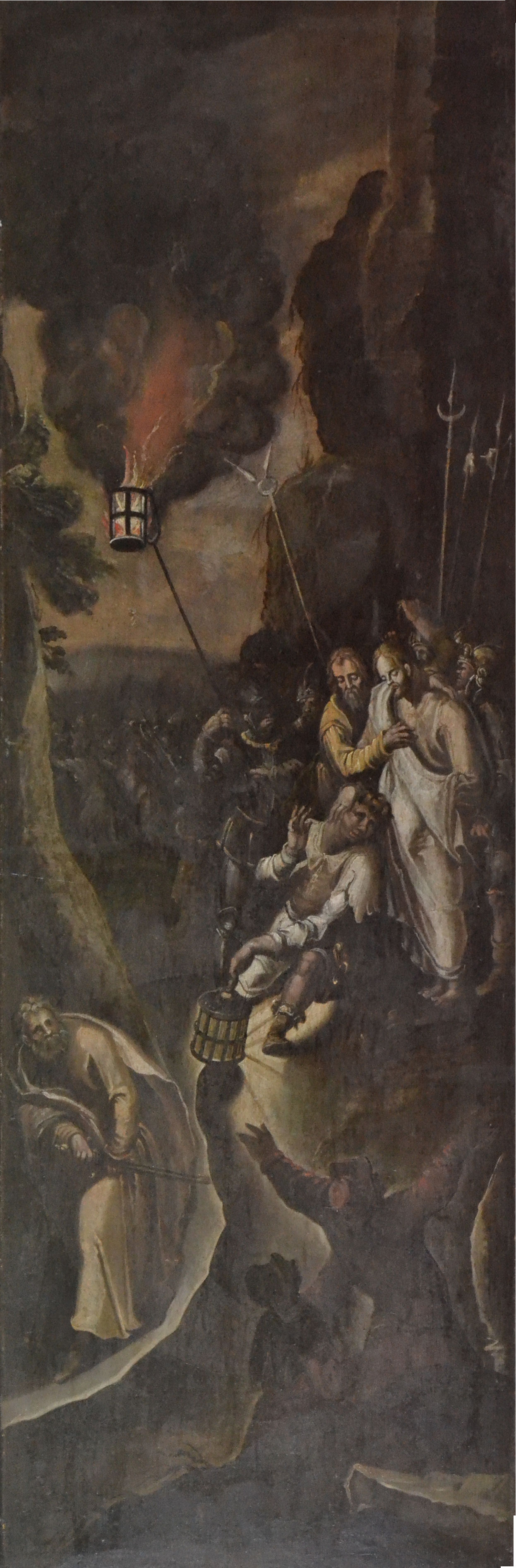 Marianowo - zespół klasztorny cystersów